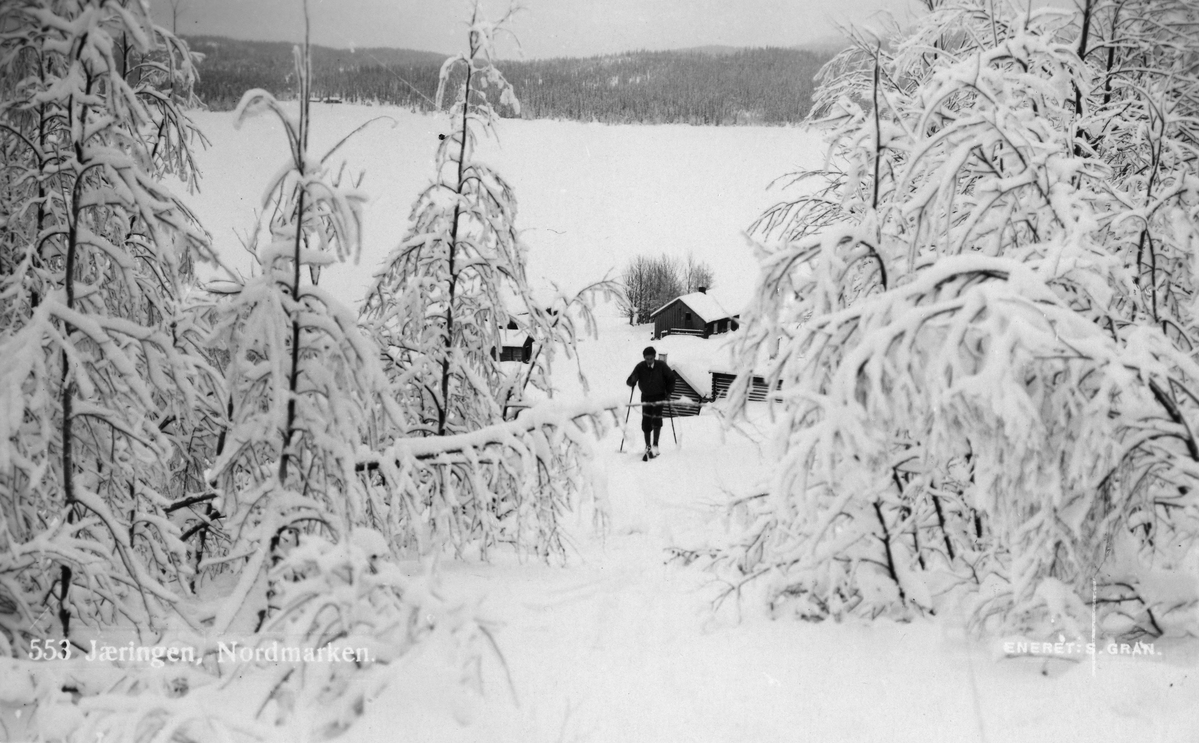 Gjerdingen, ca. 1930-1940